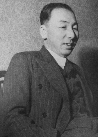 戸田康英（宮内庁傳育官）